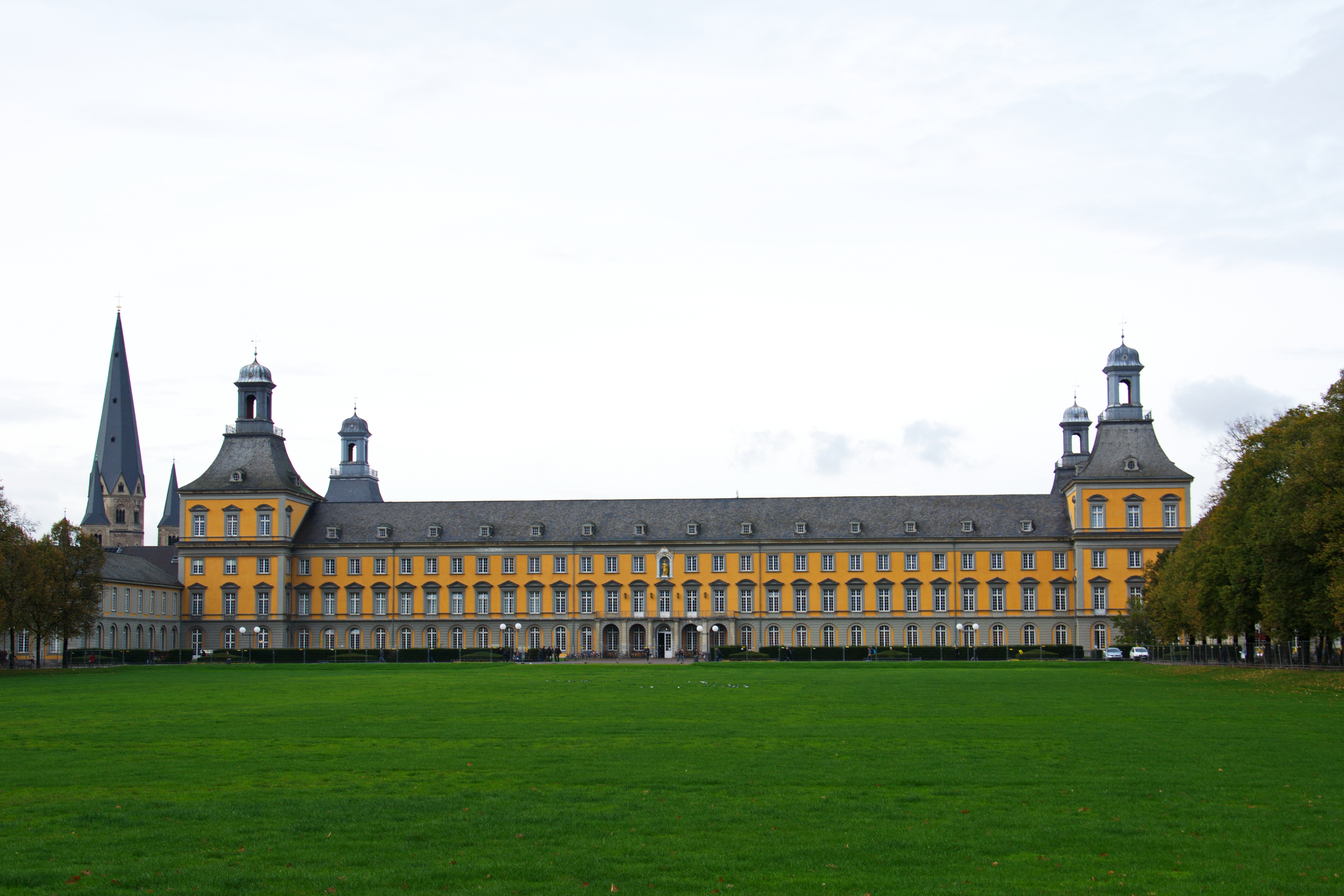 Ehemaliges kurfürstliches Schloss/Universität einschließlich Hofgarten. Am Hof/ Am Hofgarten/ Adenauerallee in Bonn